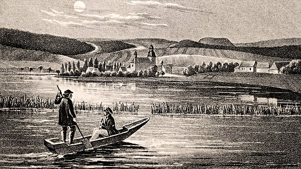 Seeburger See